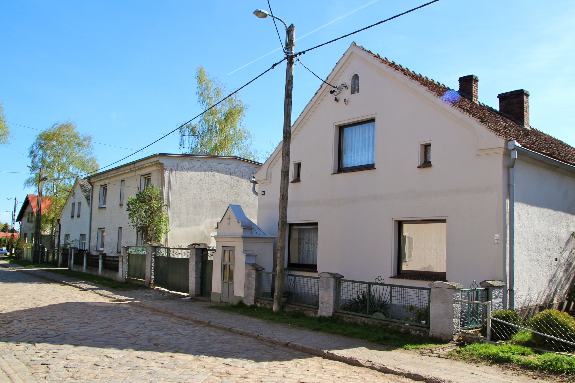 Głogowiec wieś w Polsce położona w województwie opolskim, w powiecie prudnickim, w gminie Głogówek.